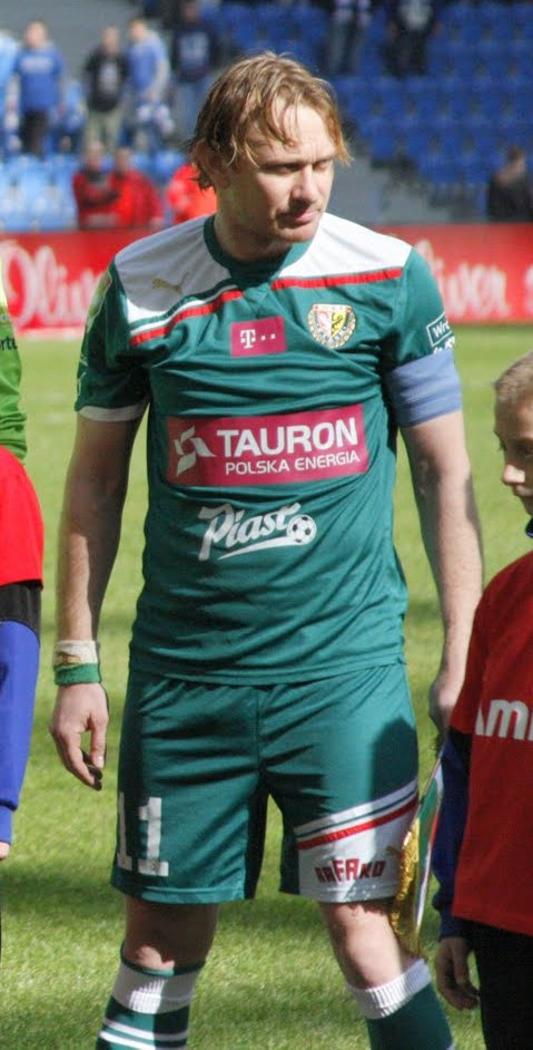 Polski piłkarz Sebastian Mila